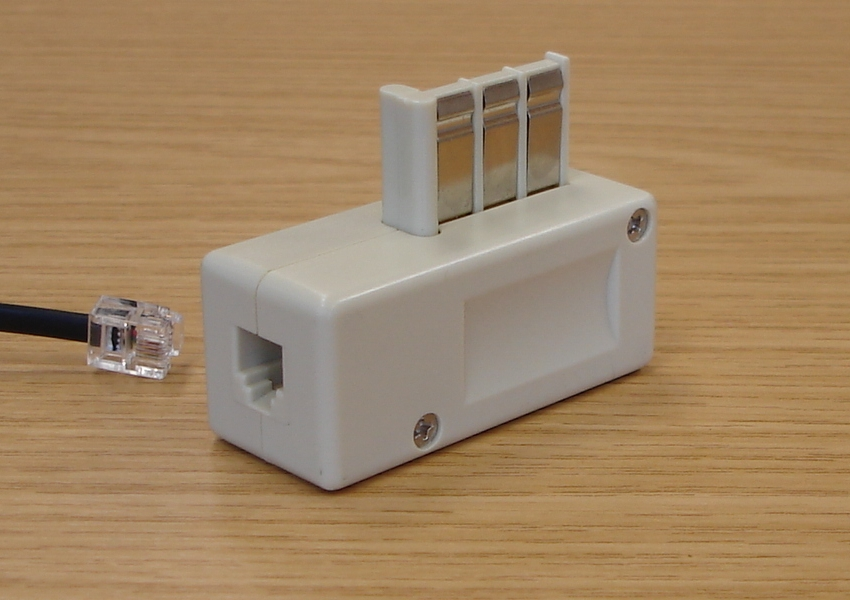 Telefonadapter RJ11 (Deutschland, USA, Spanien, Portugal, Griechenland) → Frankreich